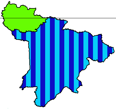 Resultados electorales en los cantones de Santo Donimgo: Rojo: PSP Amarillo: PSC Azul: Avanza Anaranjado pálido: PRE Anaranjado fuerte: MPD Rojo oscuro: FS-FA Fucsia: Pachakutik Gris: CREO Celeste: SUMA Verde limón: Alianza País Otros: Movimientos locales